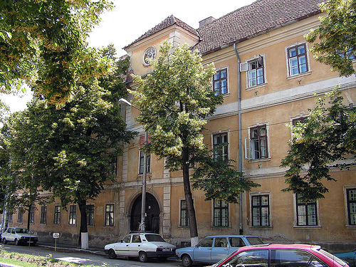 Cluj-Napoca, Colegiul Refomat (Liceul Teologic Reformat), str. M.Kogălniceanu nr.14